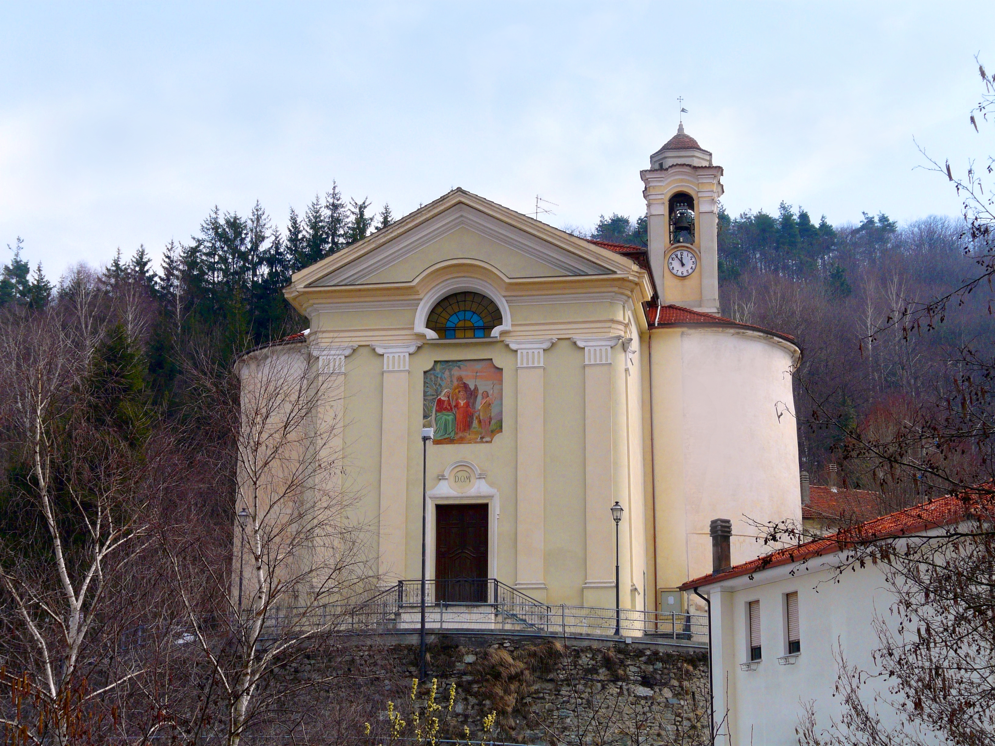 Chiesa del Santo Nome di Maria, Osiglia, Liguria, Italia